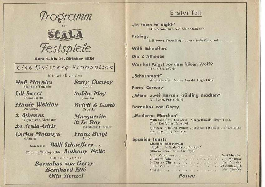 Programmheft aus dem Jahr 1934, Scala in Berlin